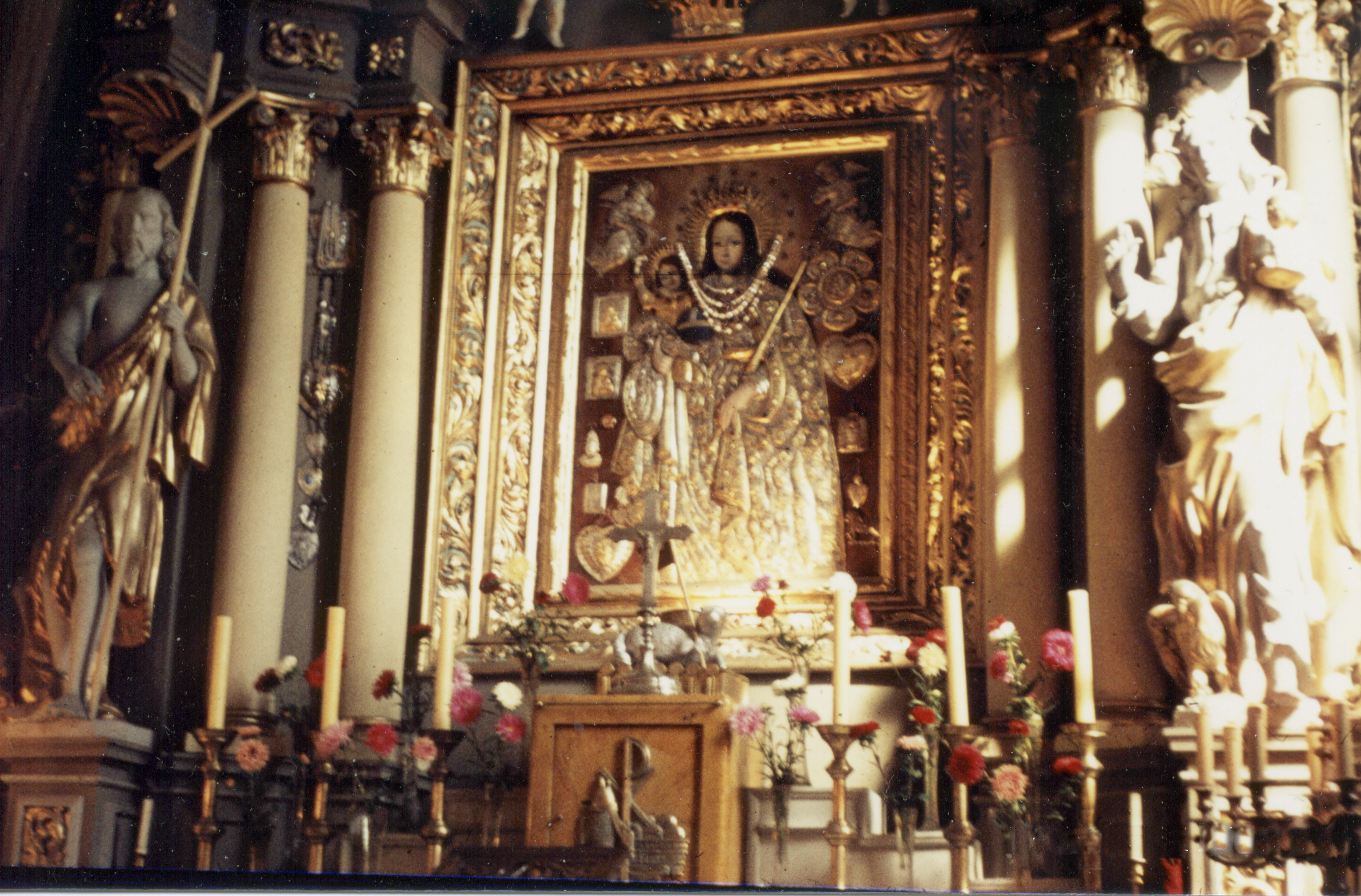 Vierge de Stary Gostyń. M .B. Starogostyńska.(1645)